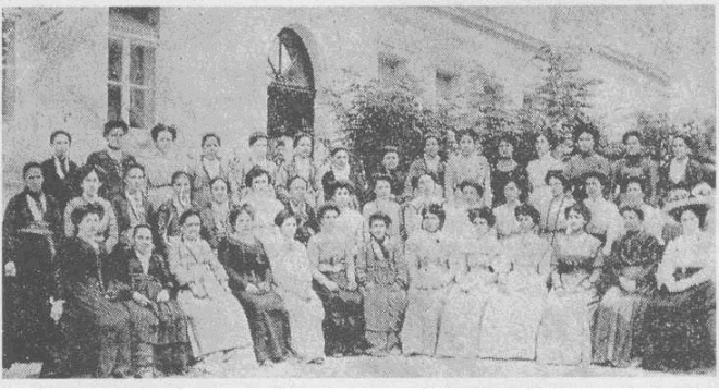 Τα ιδρυτικά μέλη της Φιλόπτωχου Αδελφότητος Κυριών Βέροιας 1905